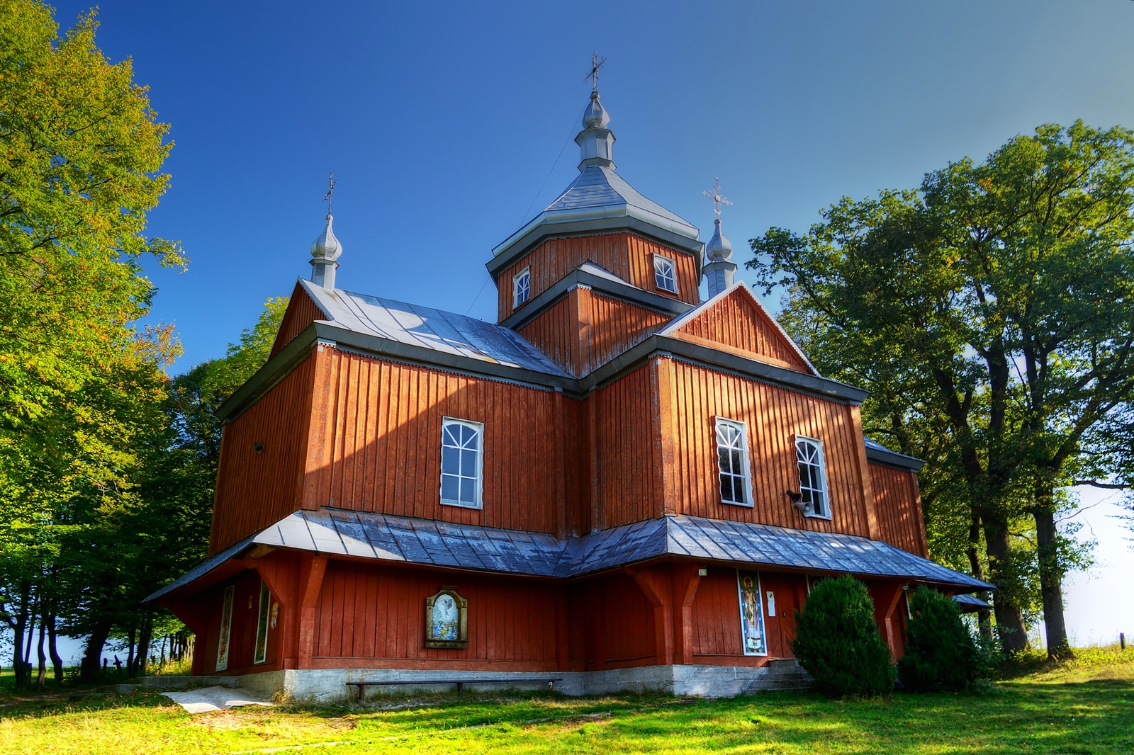 Деревянна церква 1891 року будівництва